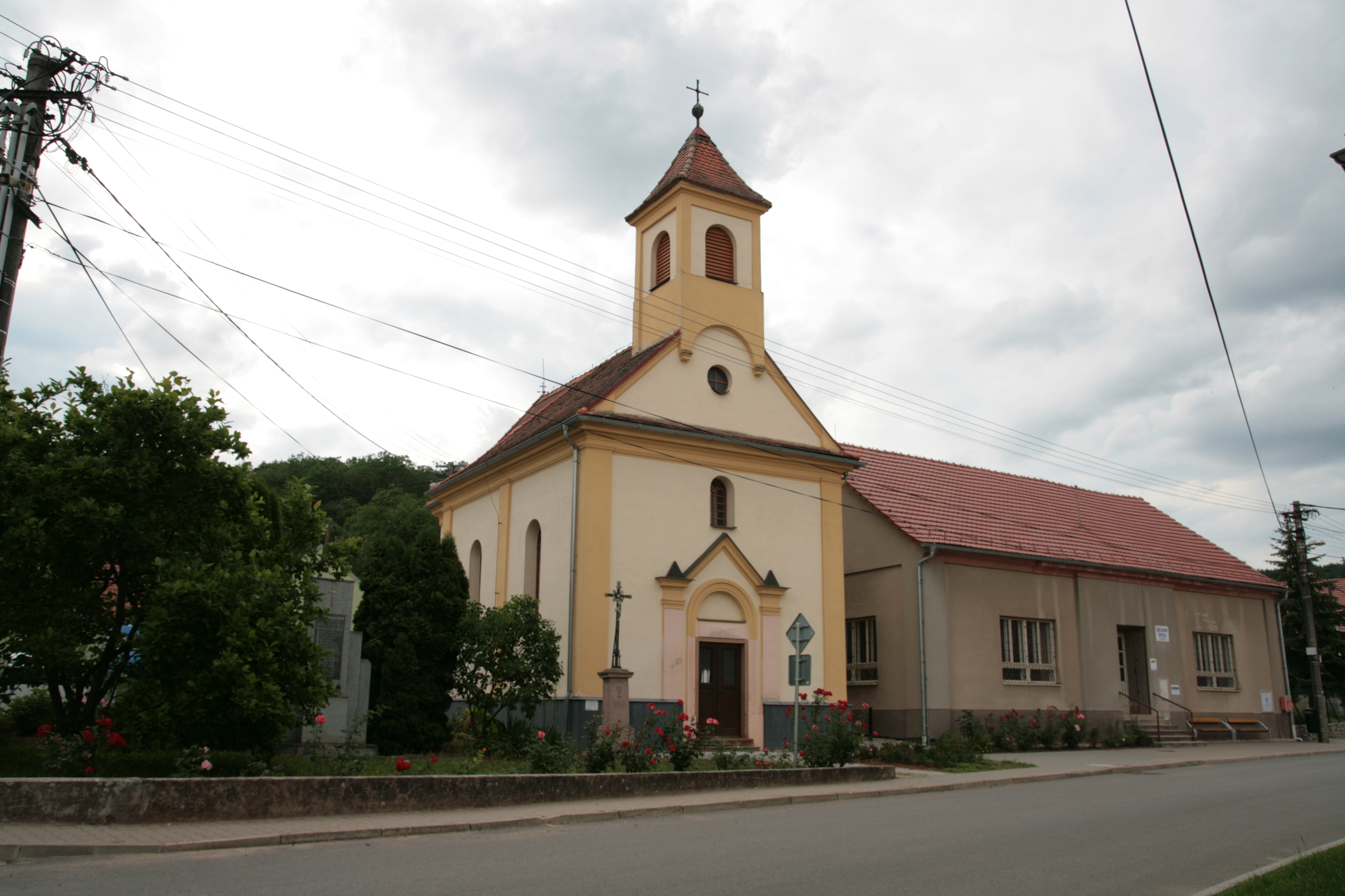 Obec Všechovice v okrese Brno-venkov. Kaple sv. Anny na návsi.